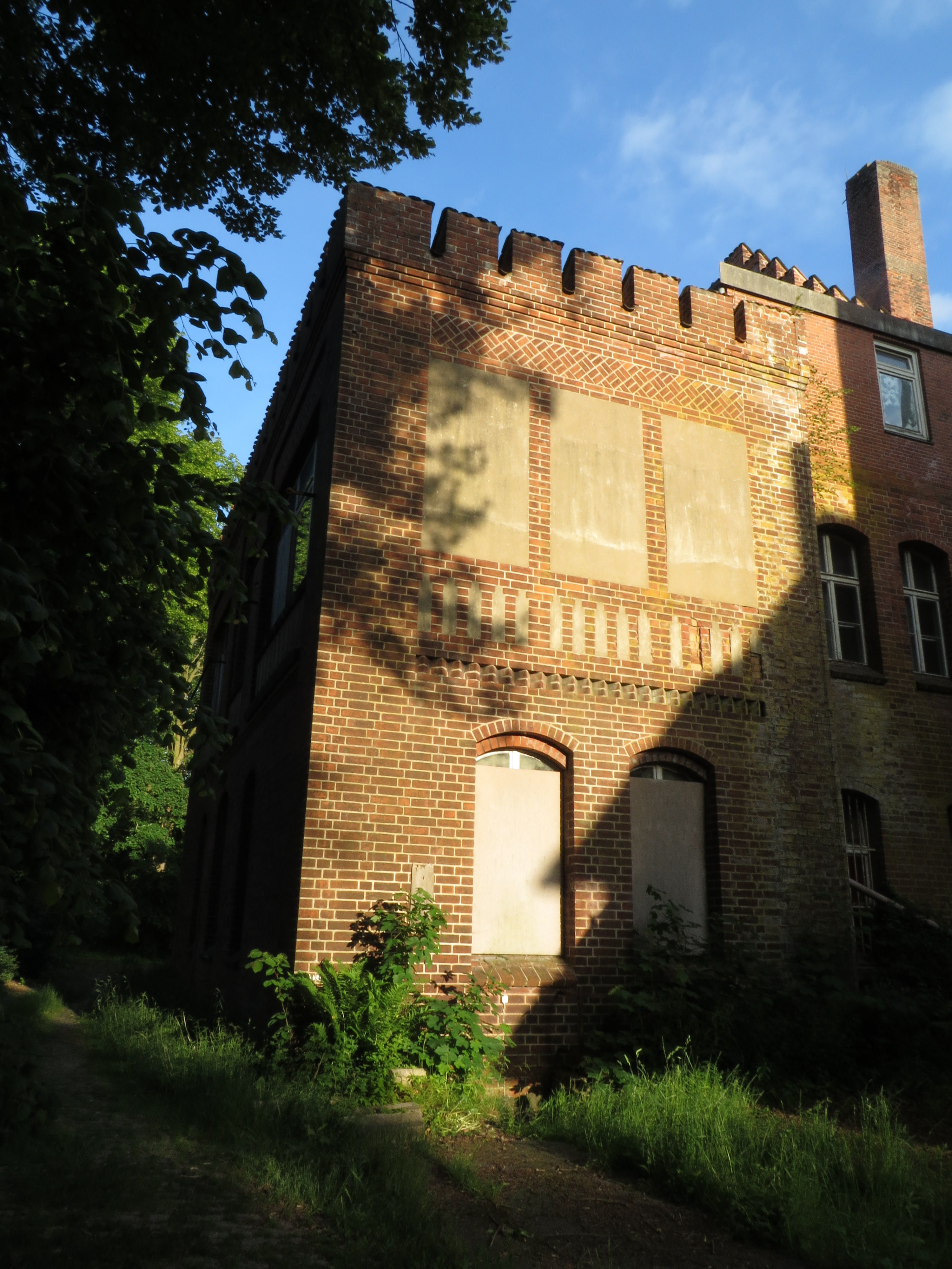 Vorburgbereich der Marine-Burg, Marinelazarett Mürwik, Burgzinnen an einem der Gebäude